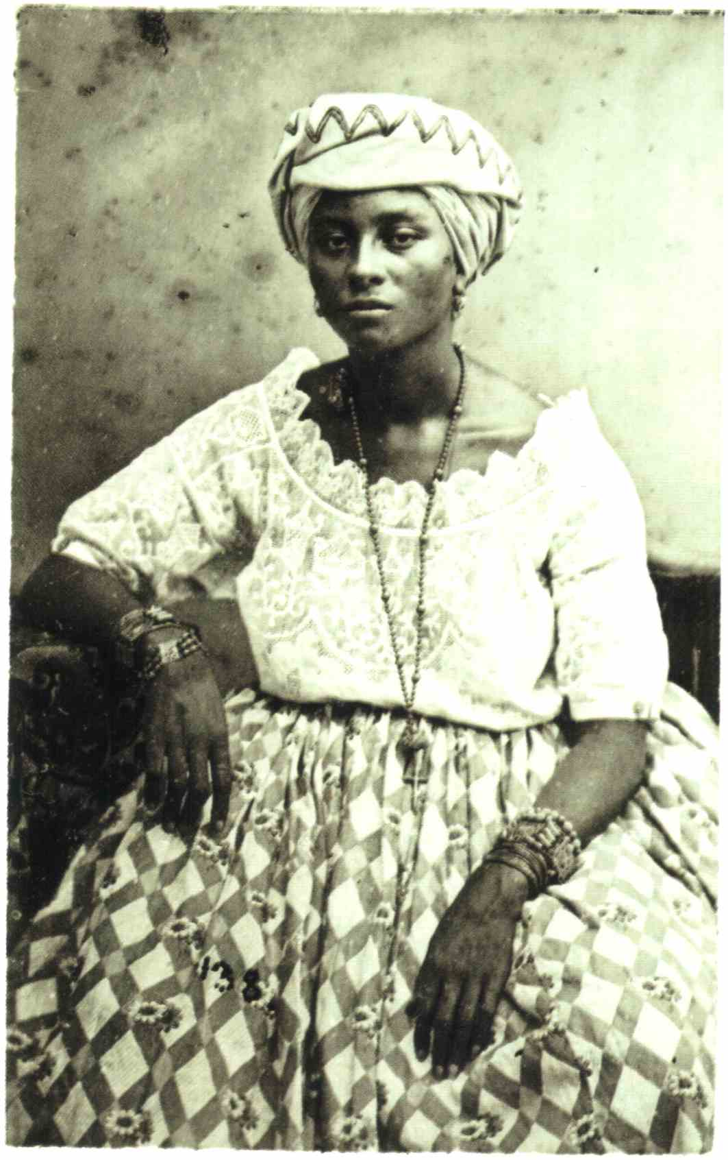 Moça Cafuza do Recife. Albúmen, carte-de-visite, 9 x 5,6 cm.